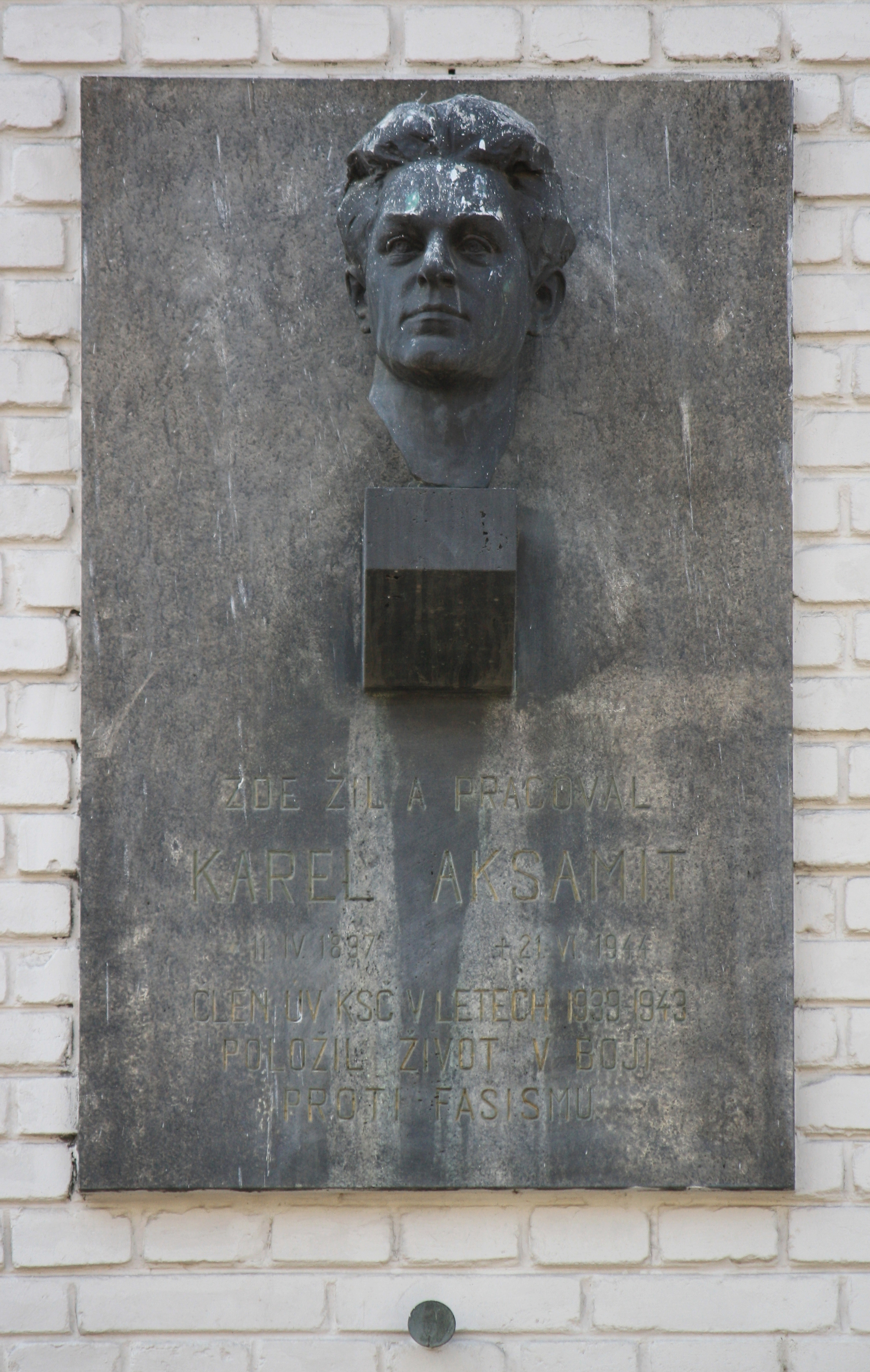 Karel Axamit - pamětní deska s bustou